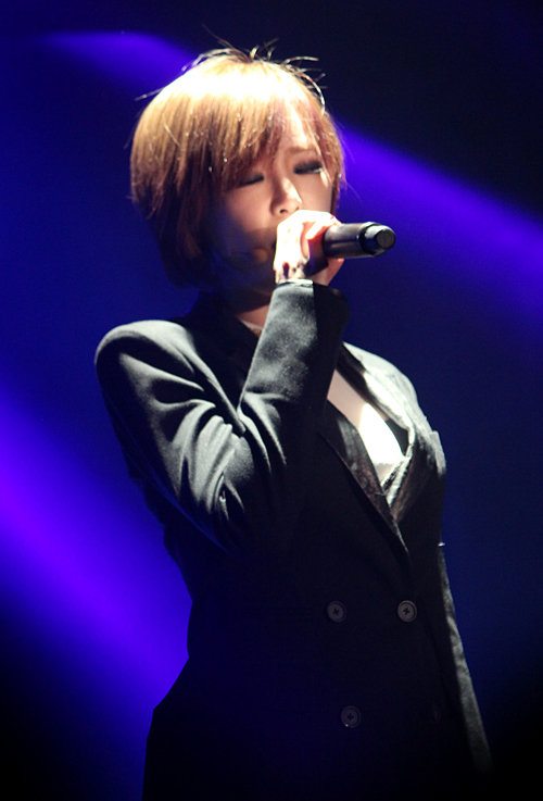 攝於2012/12/24首爾Tonight 37.2℃演唱會